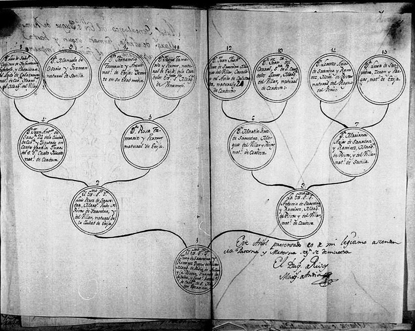 Prueba de hidalguía con árbol genealógico de tres generaciones del primer duque de Rivas.